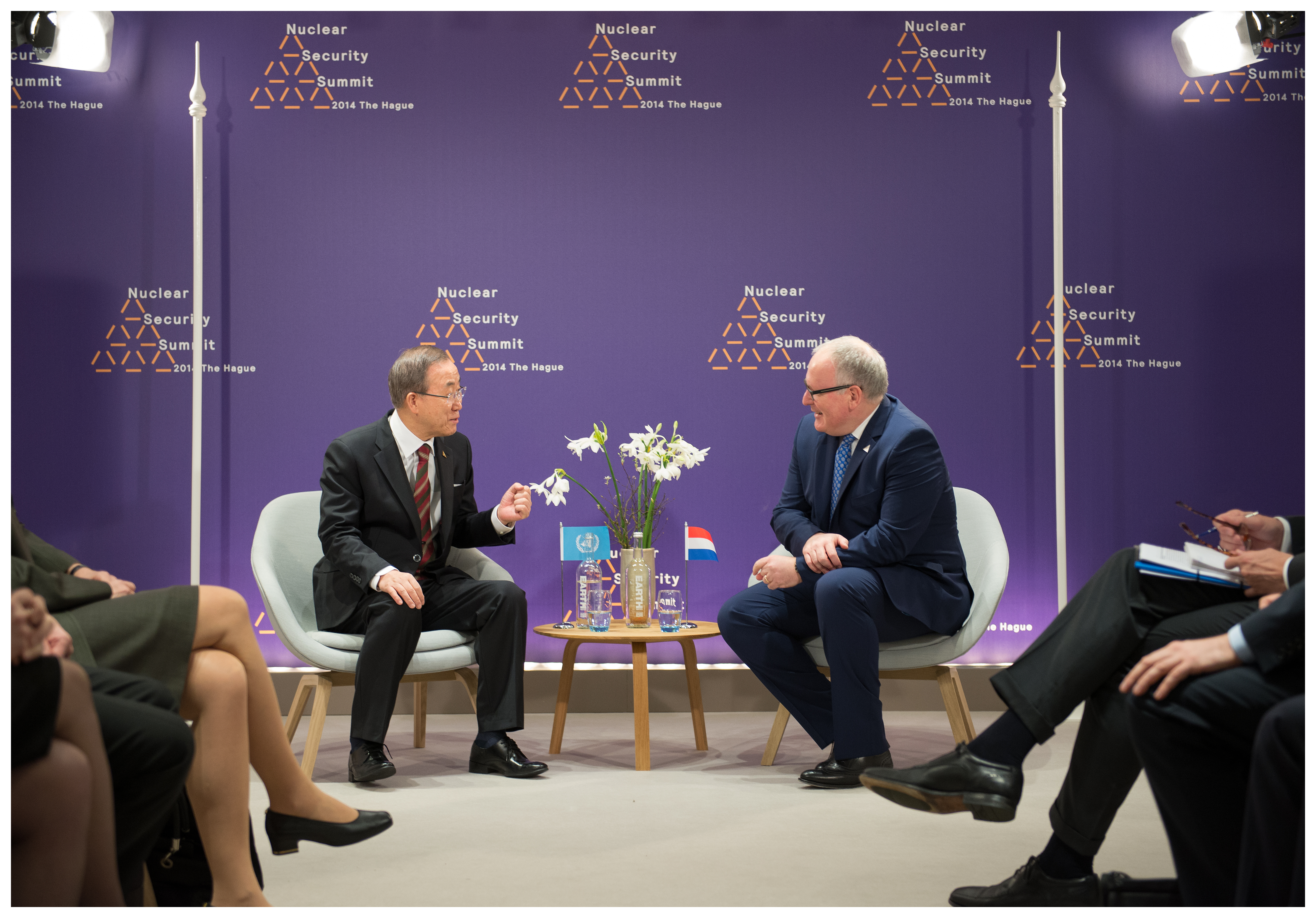 140325 Ban Ki-moon en Timmermans tijdens NSS